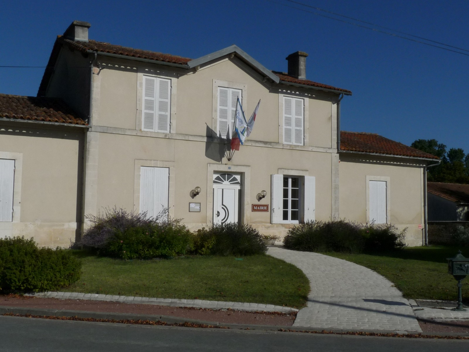 Mairie de Celles, Charente-Maritime, France